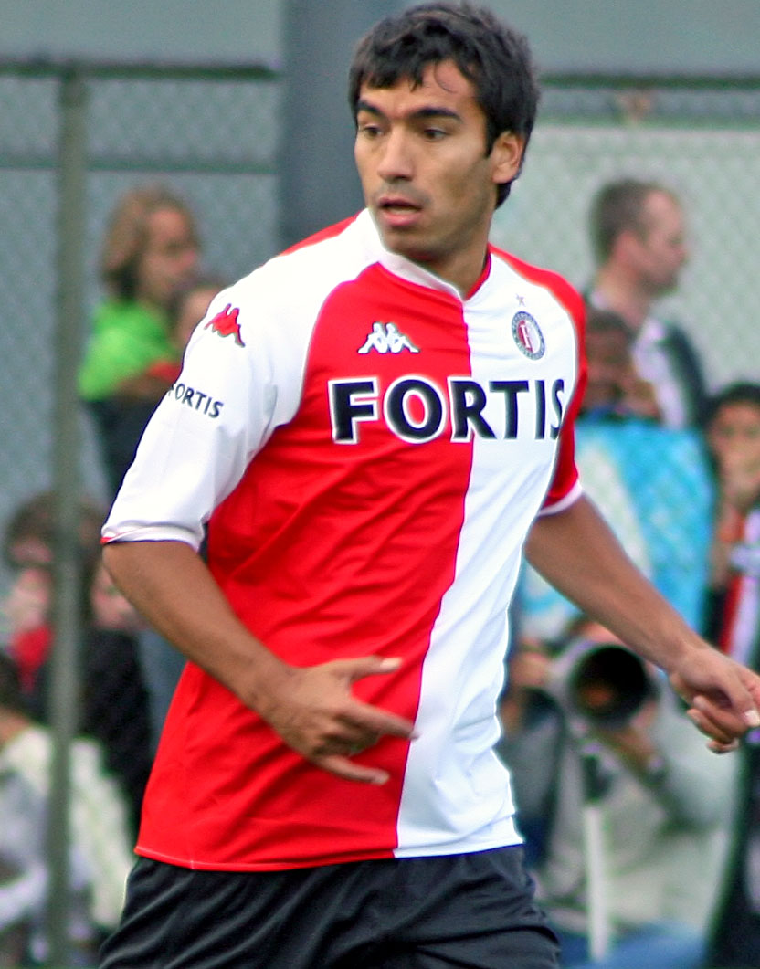 Giovanni van Bronckhorst (Feyenoord)